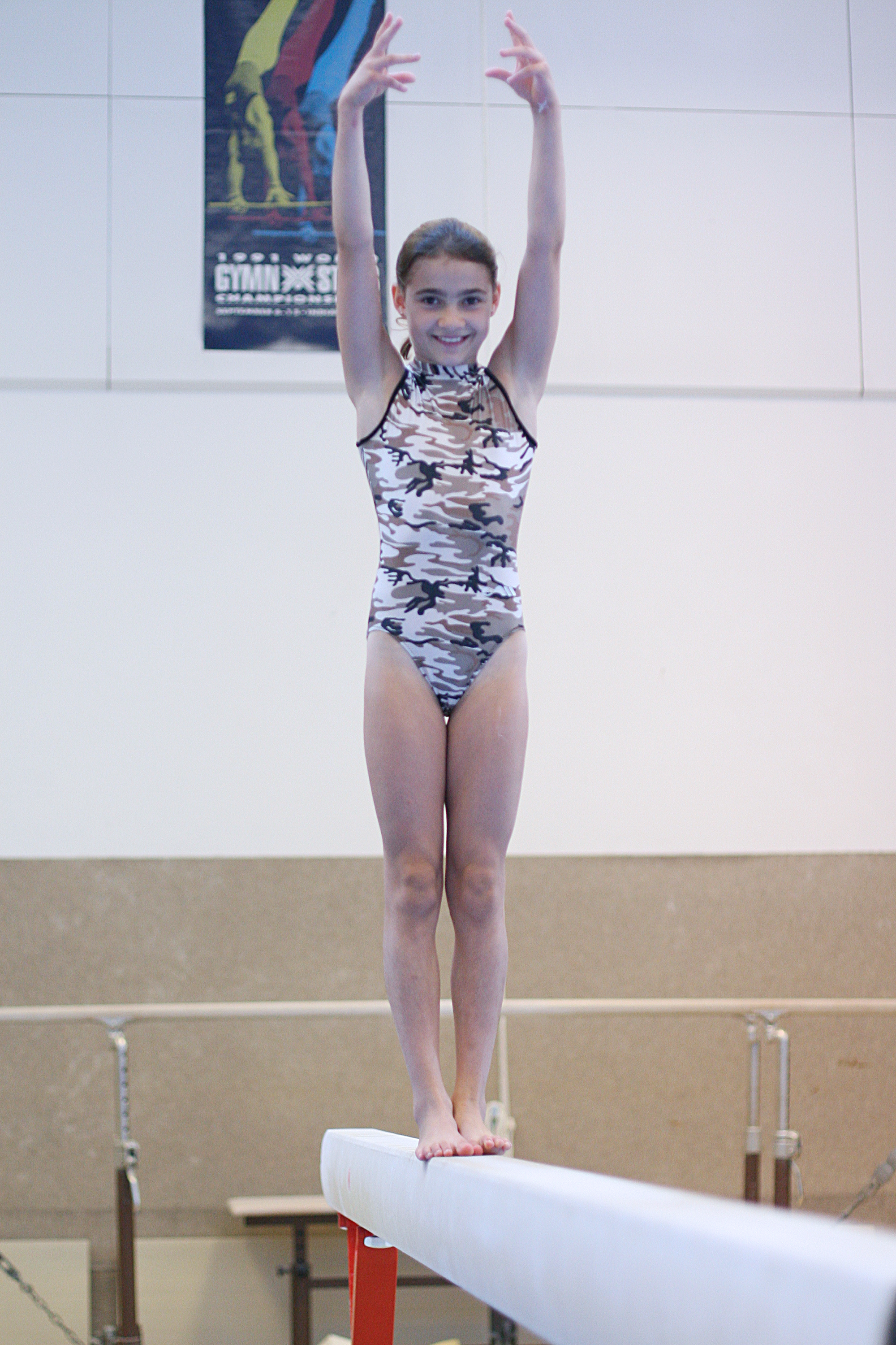 Kunstturnerin Elisa Hämmerle August 2007 im Landessportzentrum Dornbirn